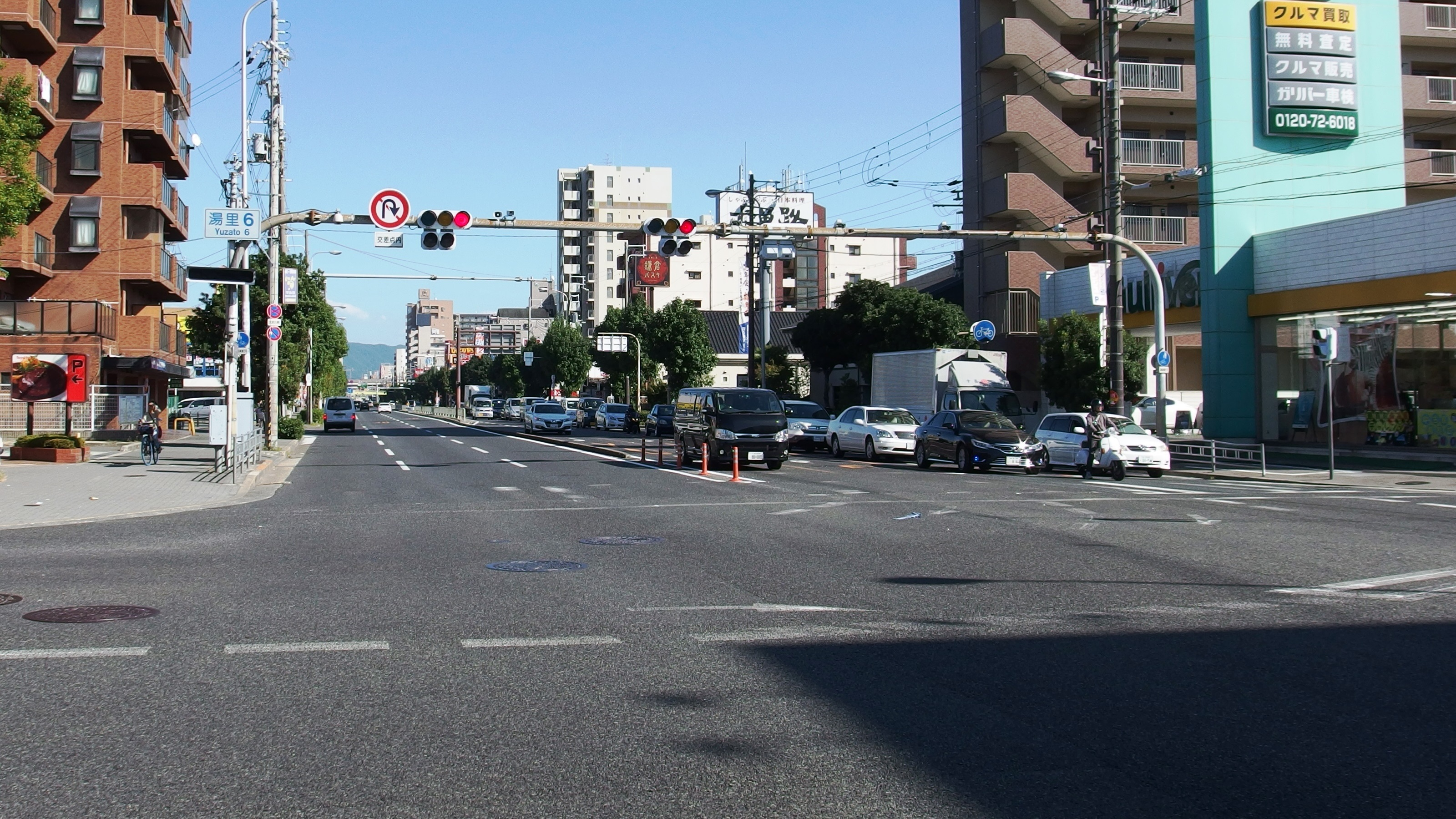 湯里6交差点, 長居公園通, 大阪府大阪市